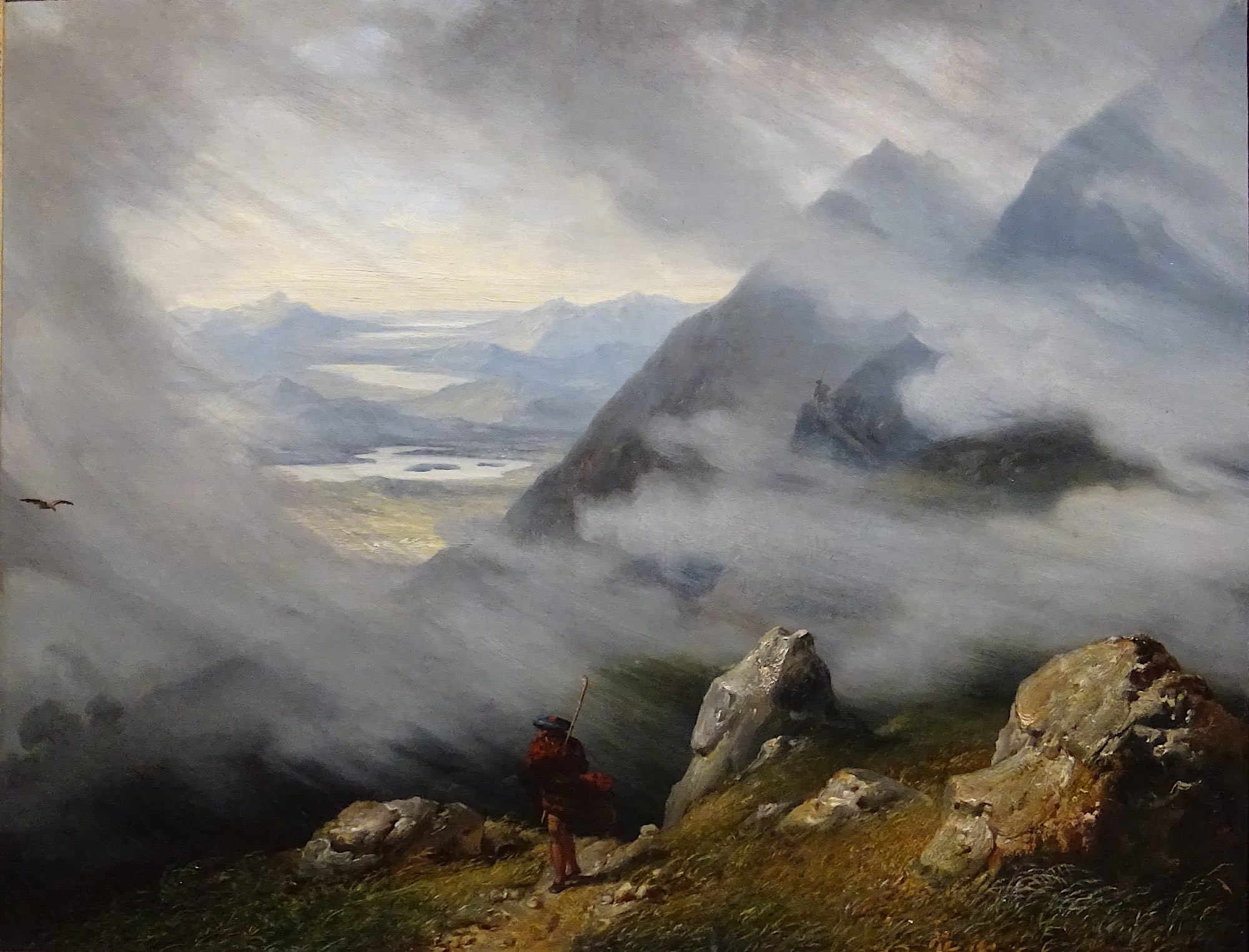 Huile sur toile - 60 x 78 cm Autun, Musée Rolin Photo : Didier Rykner